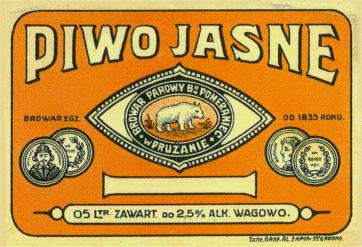 Беларуская (тарашкевіца): Этыкетка піва з паравы бровар братоў Памяранец у Пружане